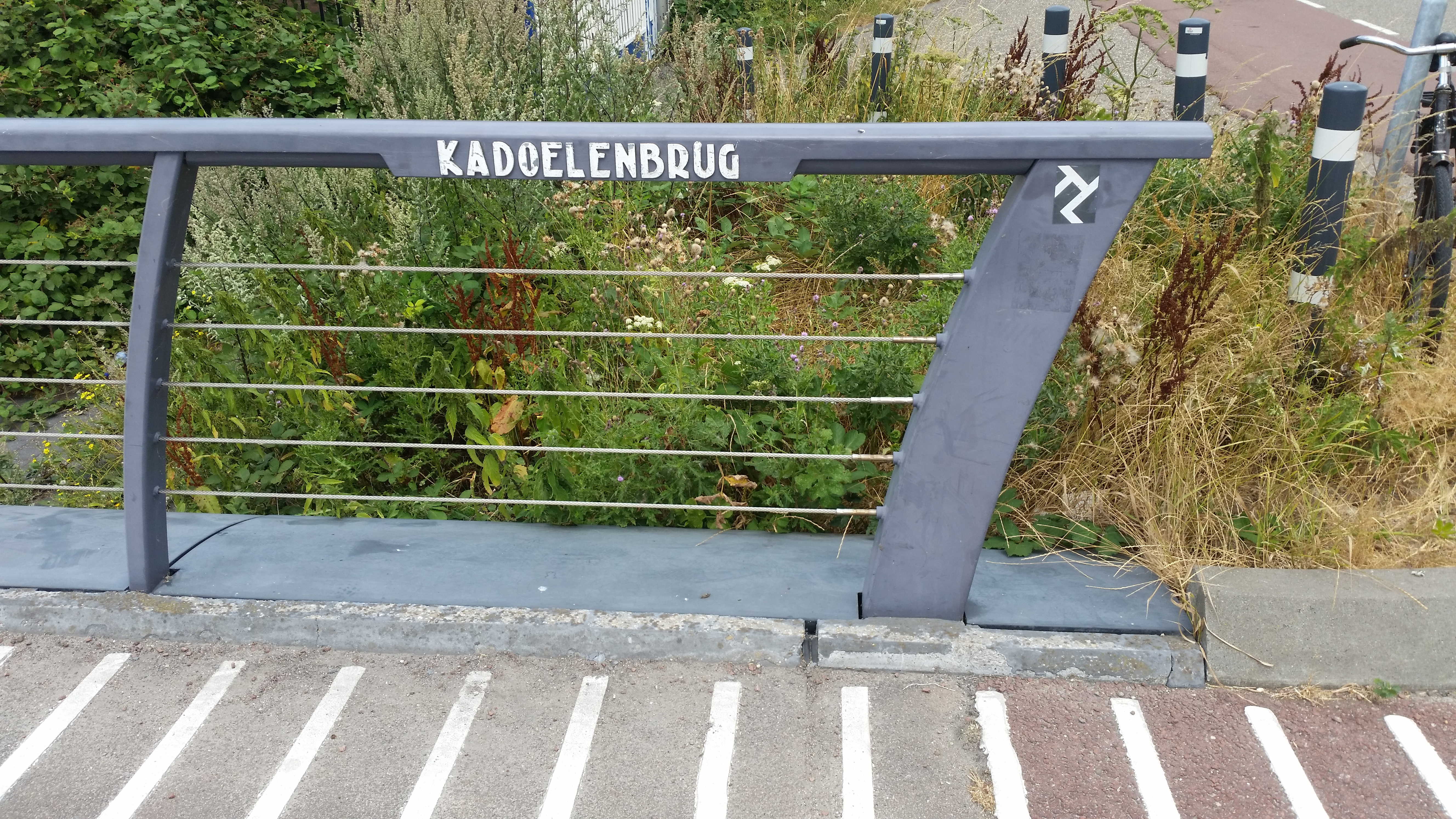 Brug 1787, Kadoelenbrug, naambord; leuningstaanders buigen naar de Landsmeerderdijk